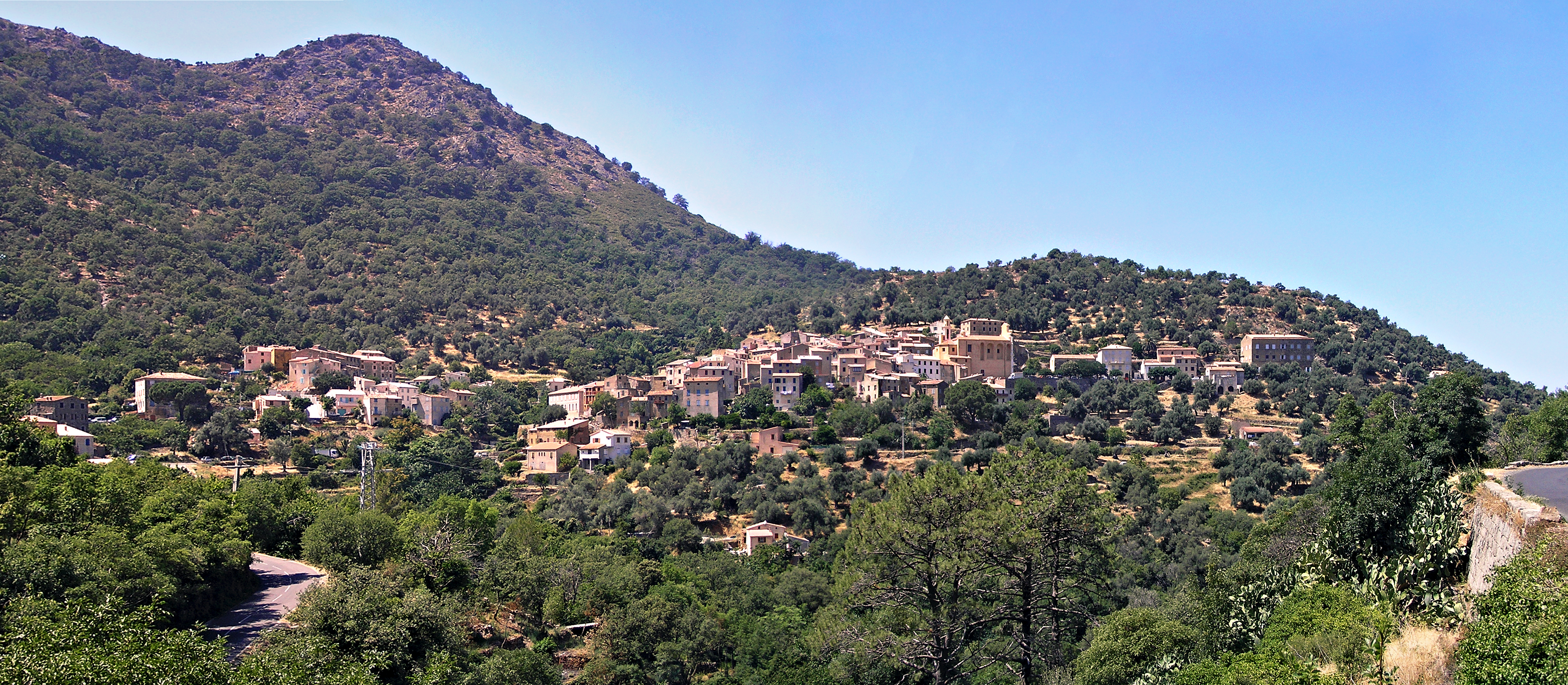 Muro, Balagne (Corse) - Panorama de Muro